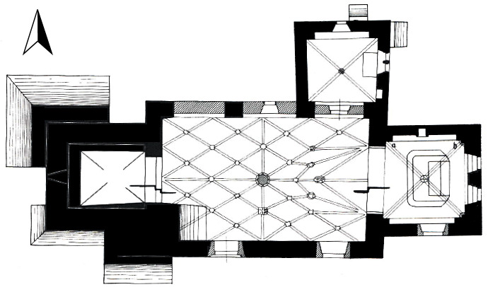 Grundriss der Kirche St. Lambertus in Daun-Steinborn